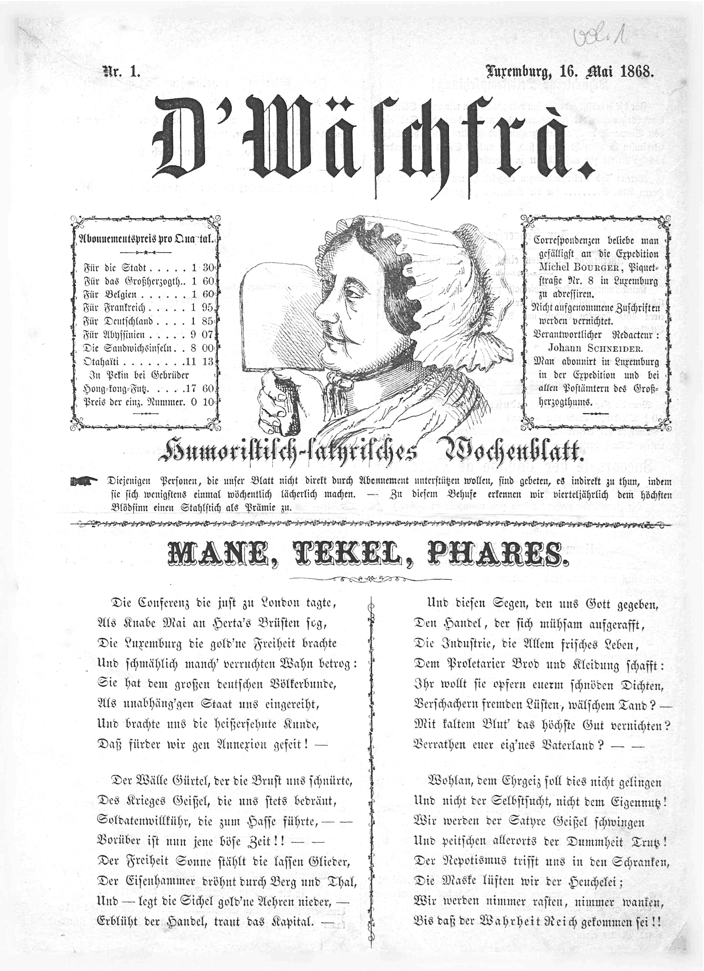 Titel vun der éischter Nummer vun der Zäitschrëft D'Wäschfra. Humoristisch-satyrisches Wochenblatt, vum 16. Mee 1868.